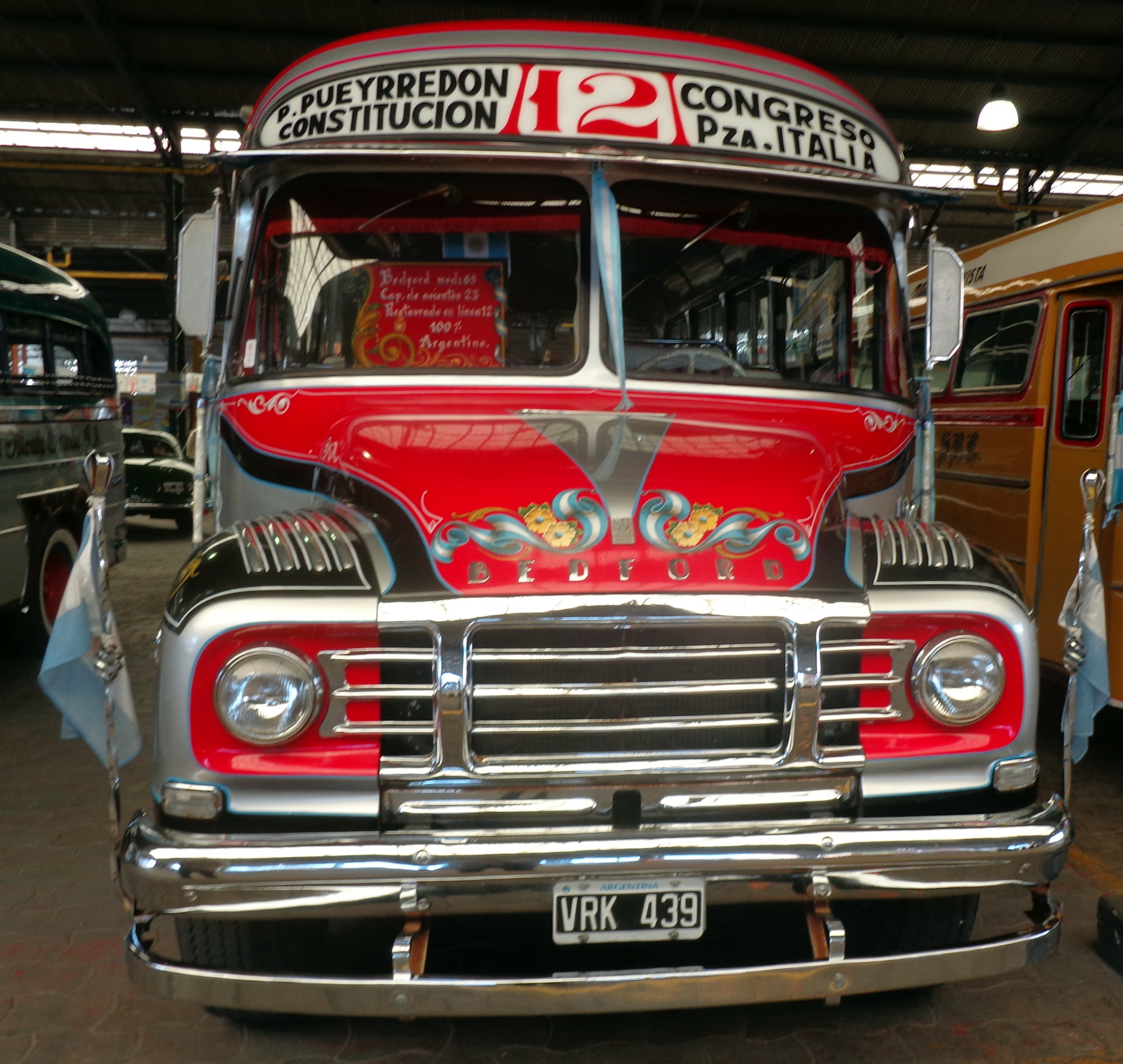 Colectivo restaurado modelo 65 de la línea 12, marca Bedford (industria argentina), con fileteado (Dinare).